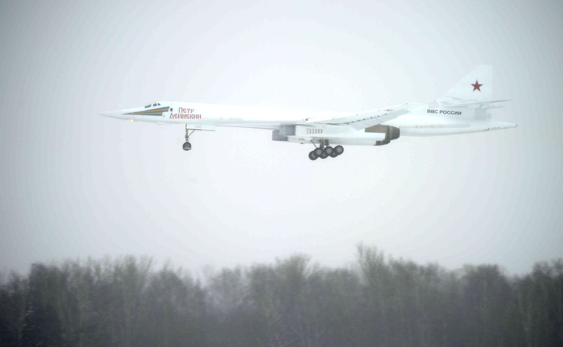 Демонстрационный полёт нового сверхзвукового стратегического бомбардировщика-ракетоносца «Ту-160М» «Петр Дейнекин»